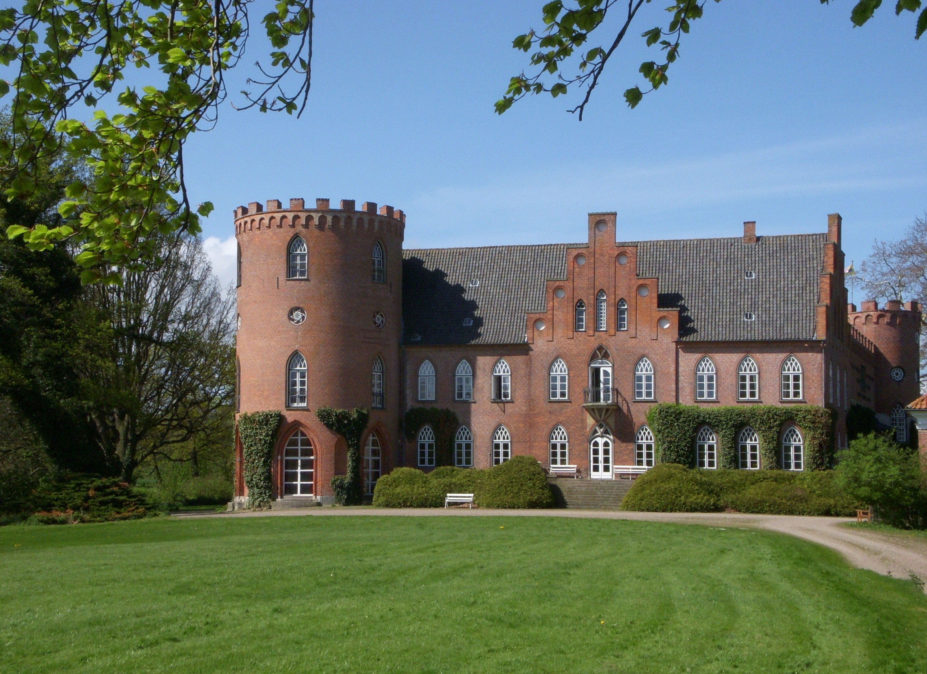 Gut Farve, Garstenseite